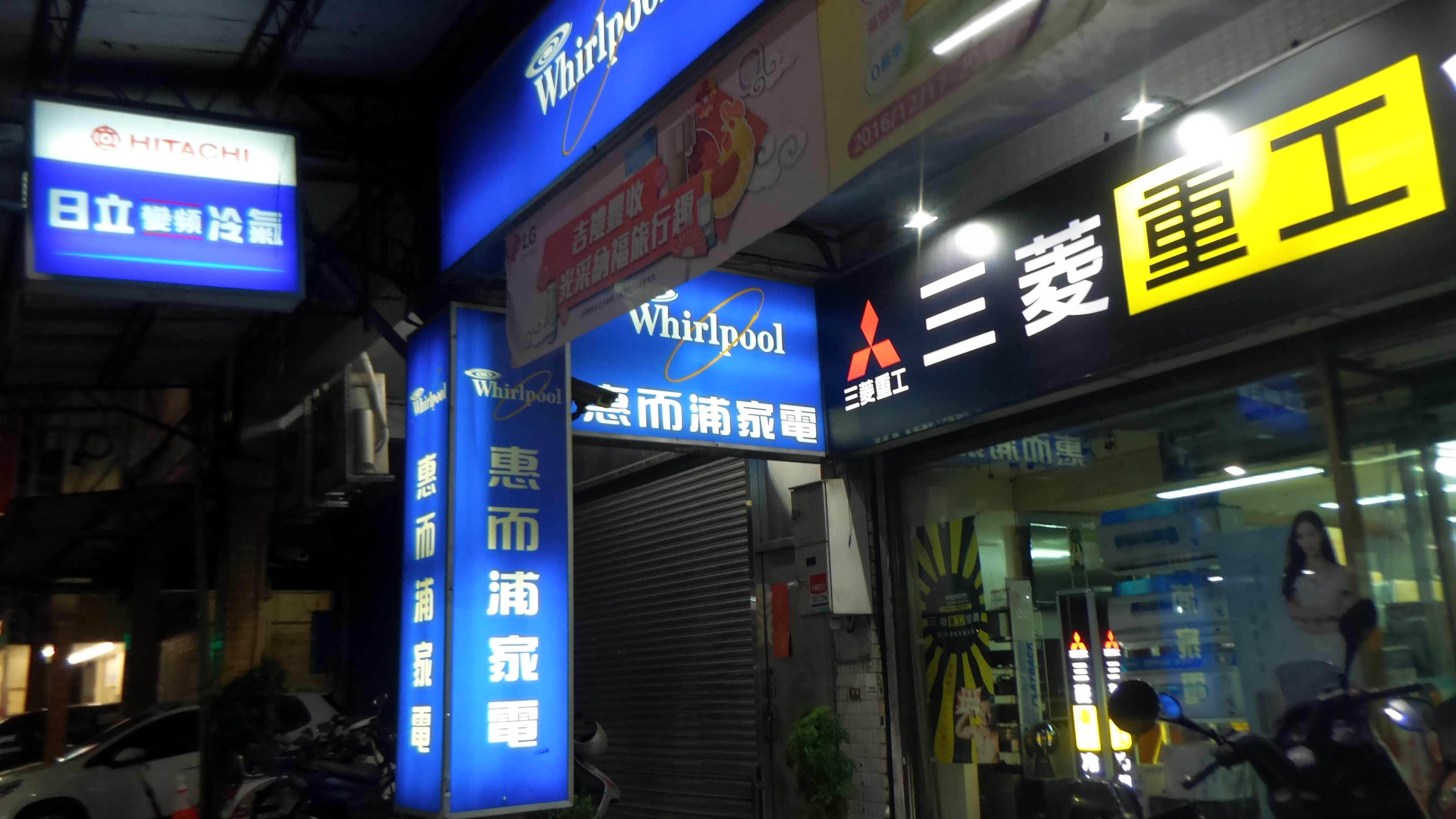 新北市一間家電專門店，兼營惠而浦、三菱重工、日立三種品牌家電及冷氣。